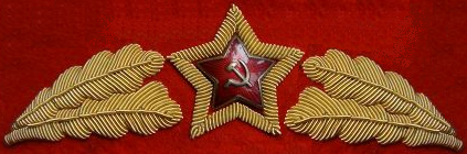 околыш фуражки ОРПК